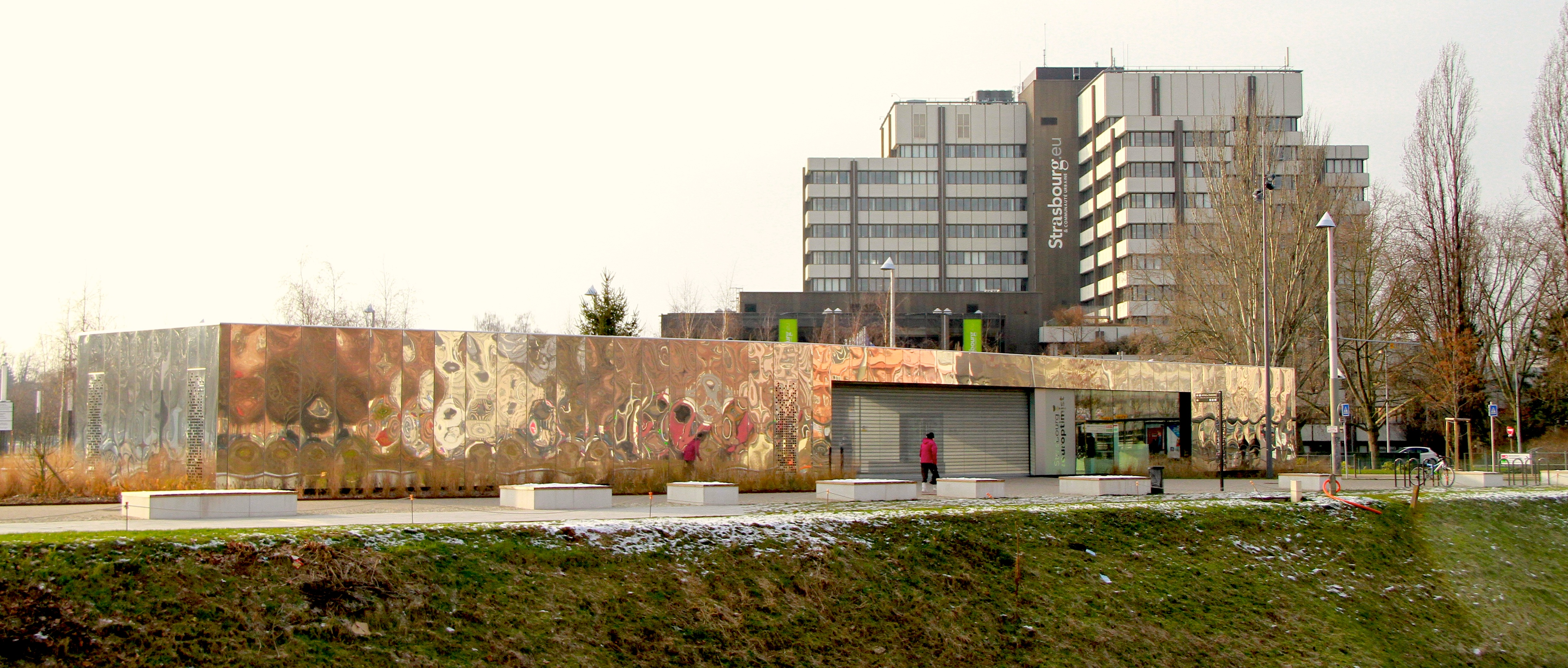 Strasbourg pavillon d'accueil de l'office de toursime janvier 2013